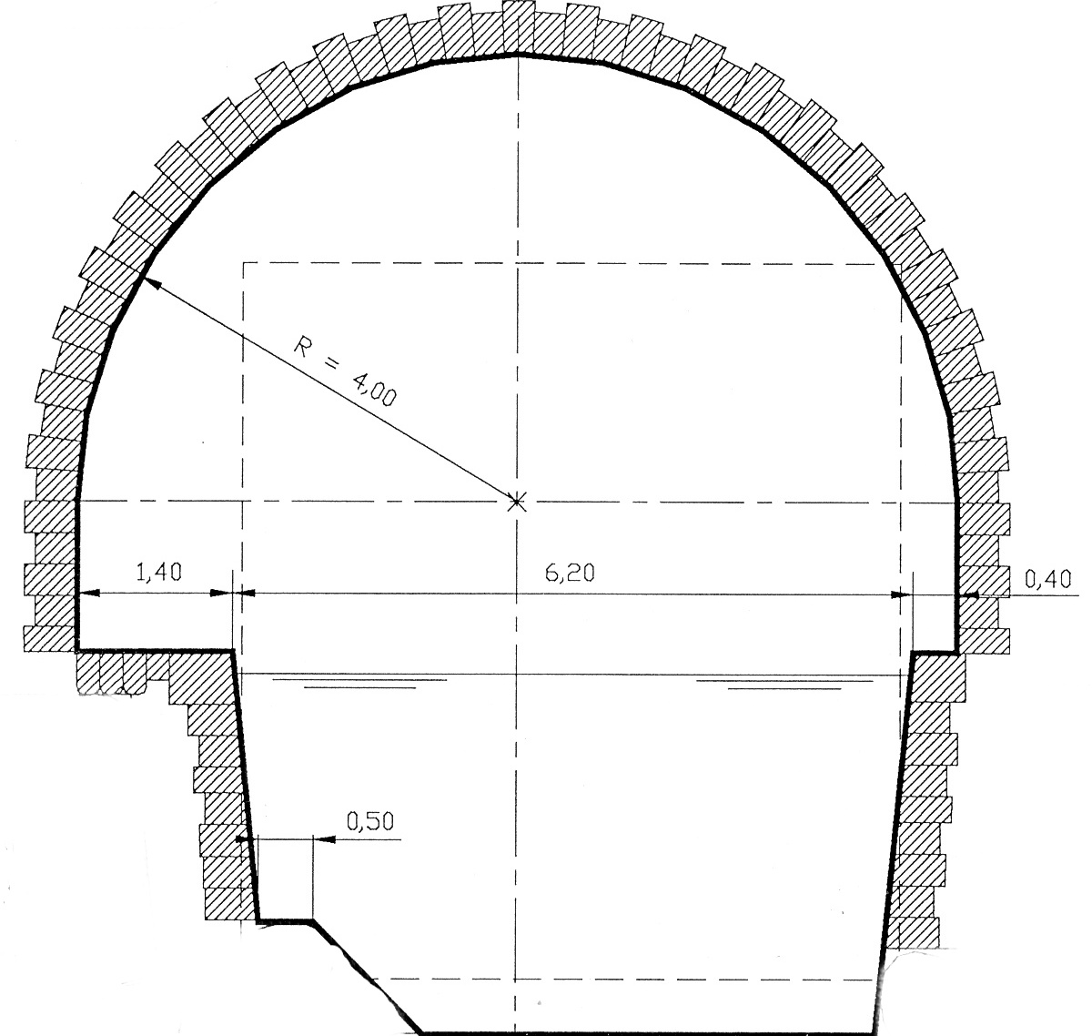 Reconstitution du profil du tunnel de Foug d'après la description dans les ouvrages de référence